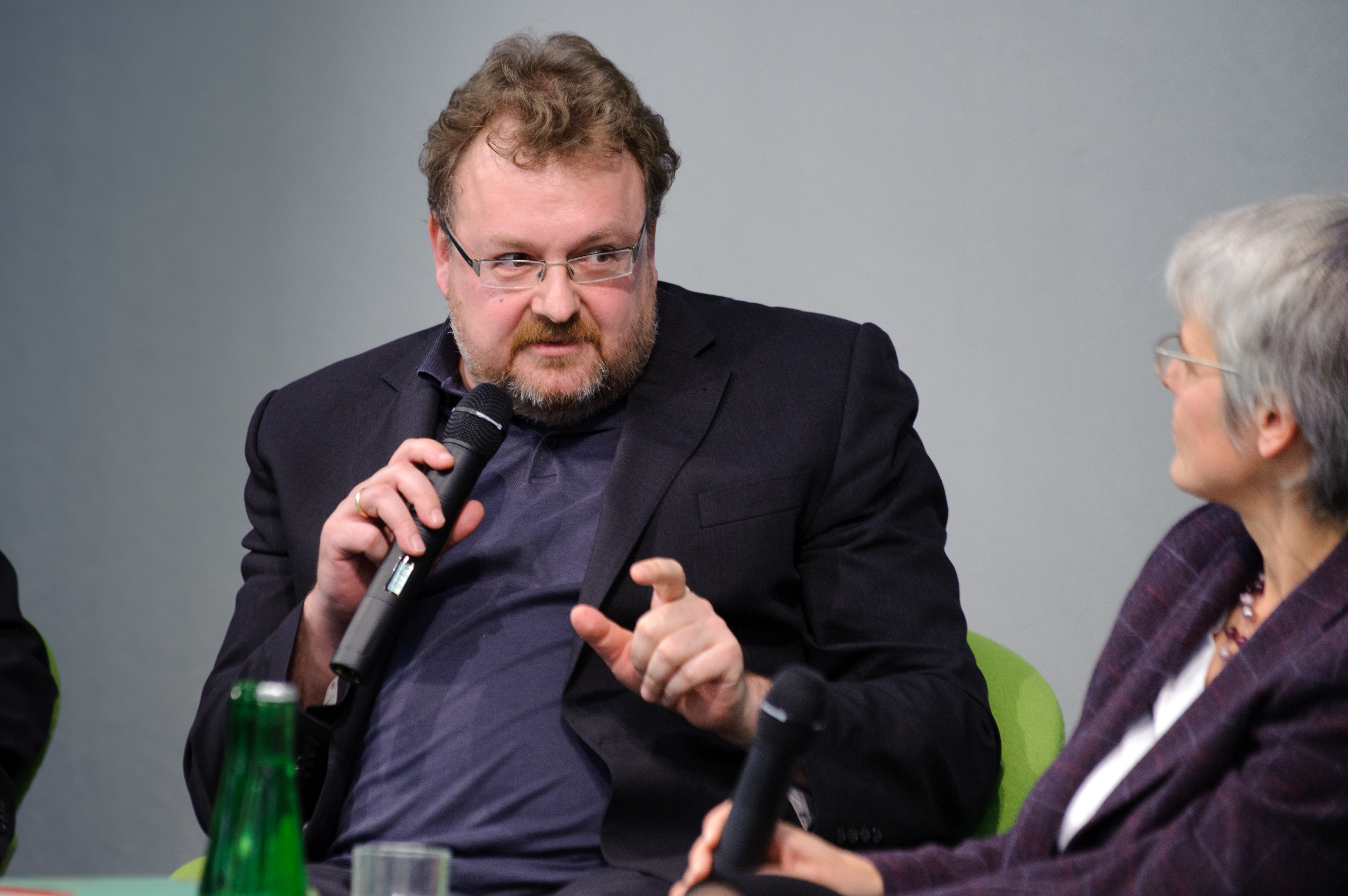 Jürgen Kaube, FAZ Foto: Stephan Röhl